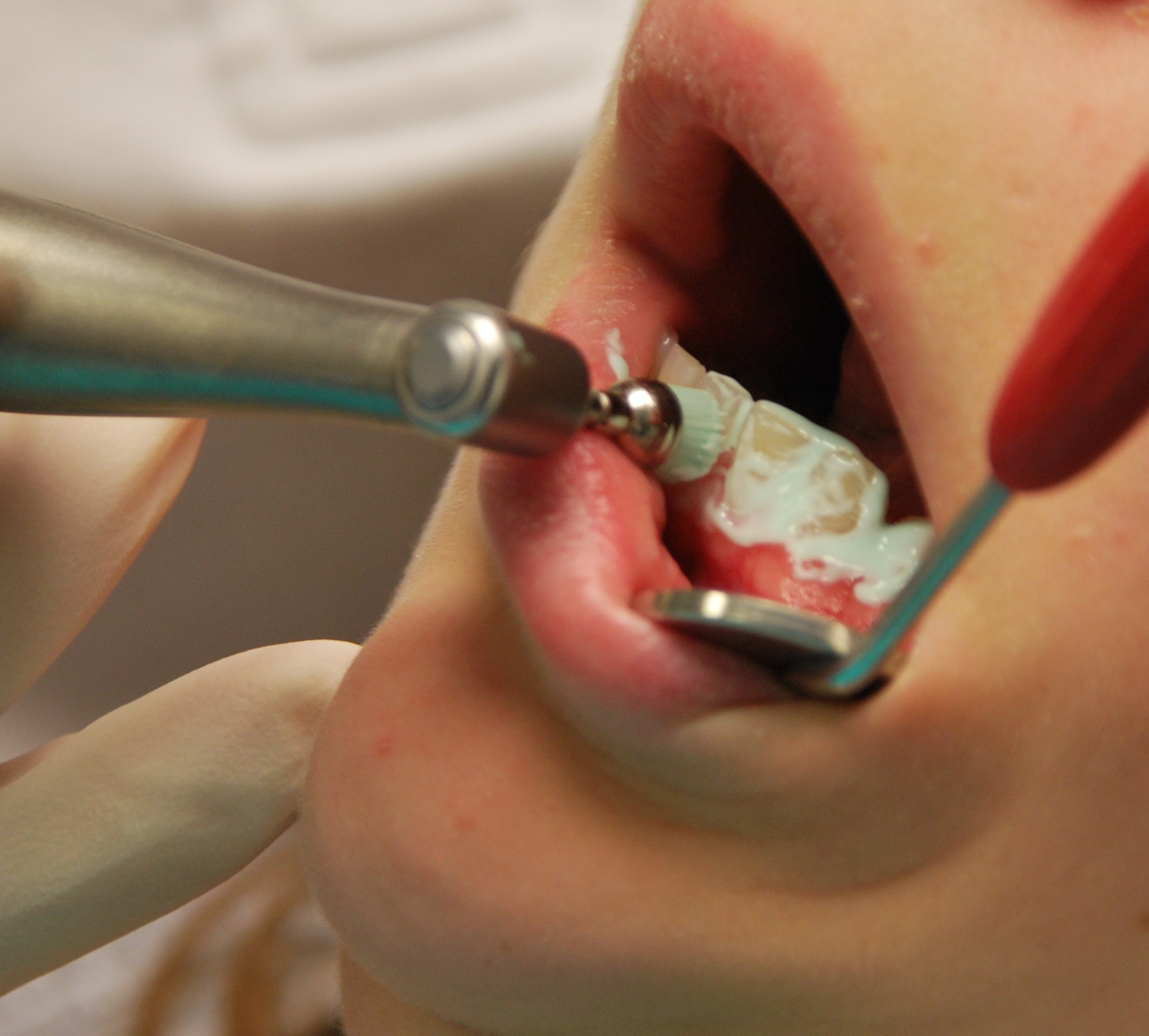 Dentální hygiena - airflow